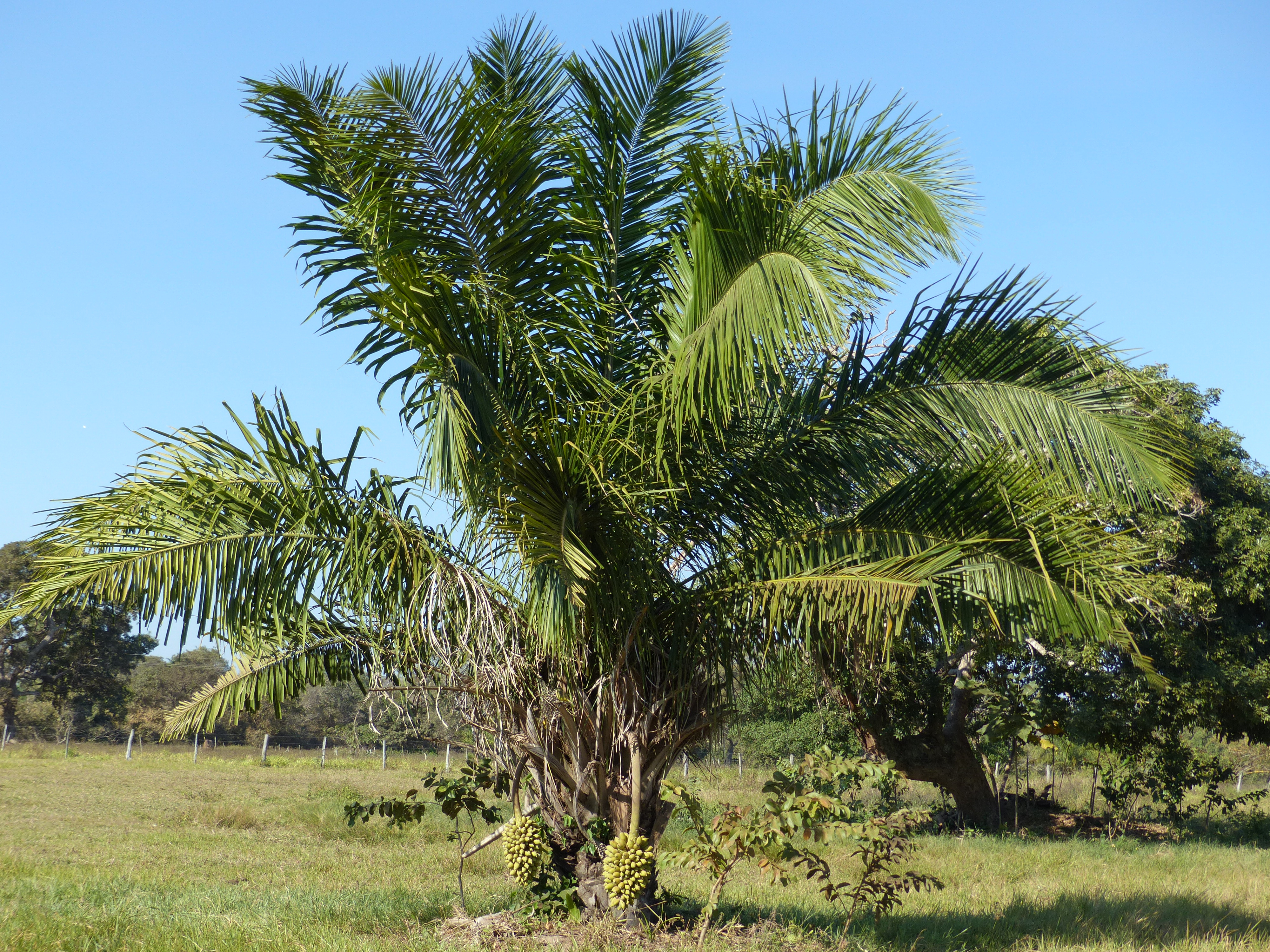 Transpantaneira, Poconé, Mato Grosso, BRAZIL